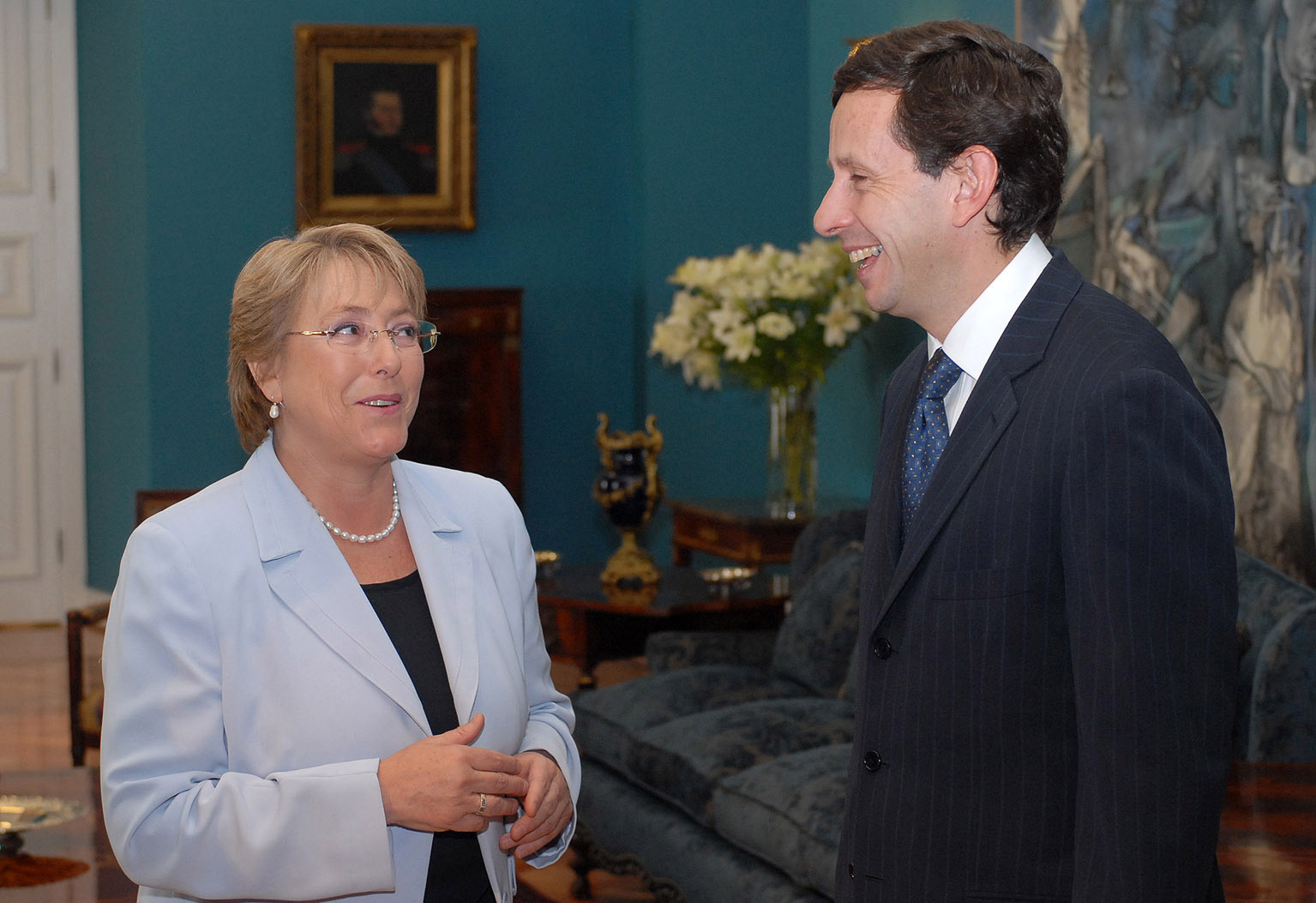 Designación de José De Gregorio como Presidente del Banco Central de Chile. Fotografía de la Presidencia de la República. 7 de diciembre de 2007.